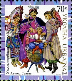 «Свято Семена». Почтовая марка Украины - Богдан Хмельницкий